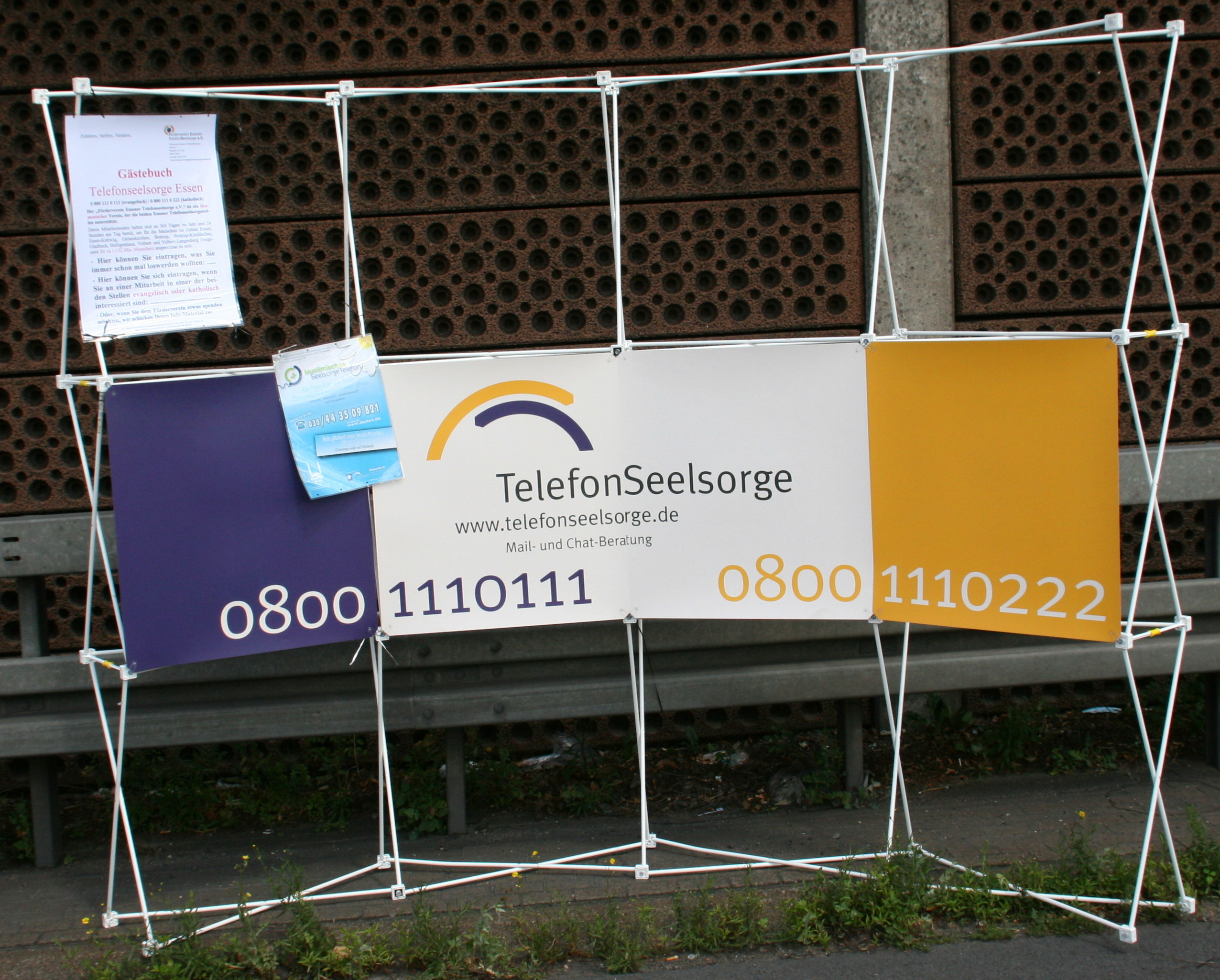 Still-Leben auf dem Ruhrschnellweg / A40 in Mülheim an der Ruhr